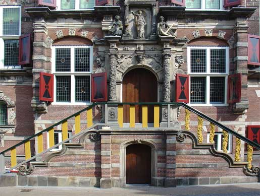 Bordes van het stadhuis van Bolsward